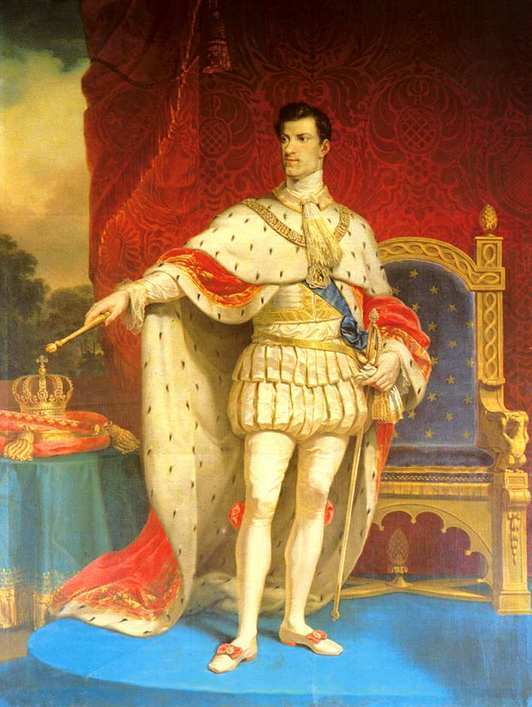 Король Карл Альберт